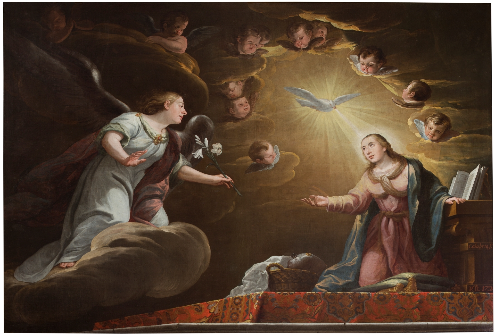 La obra representa el momento en que el arcángel San Gabriel anunció a la Virgen María que sería la madre del Mesías.